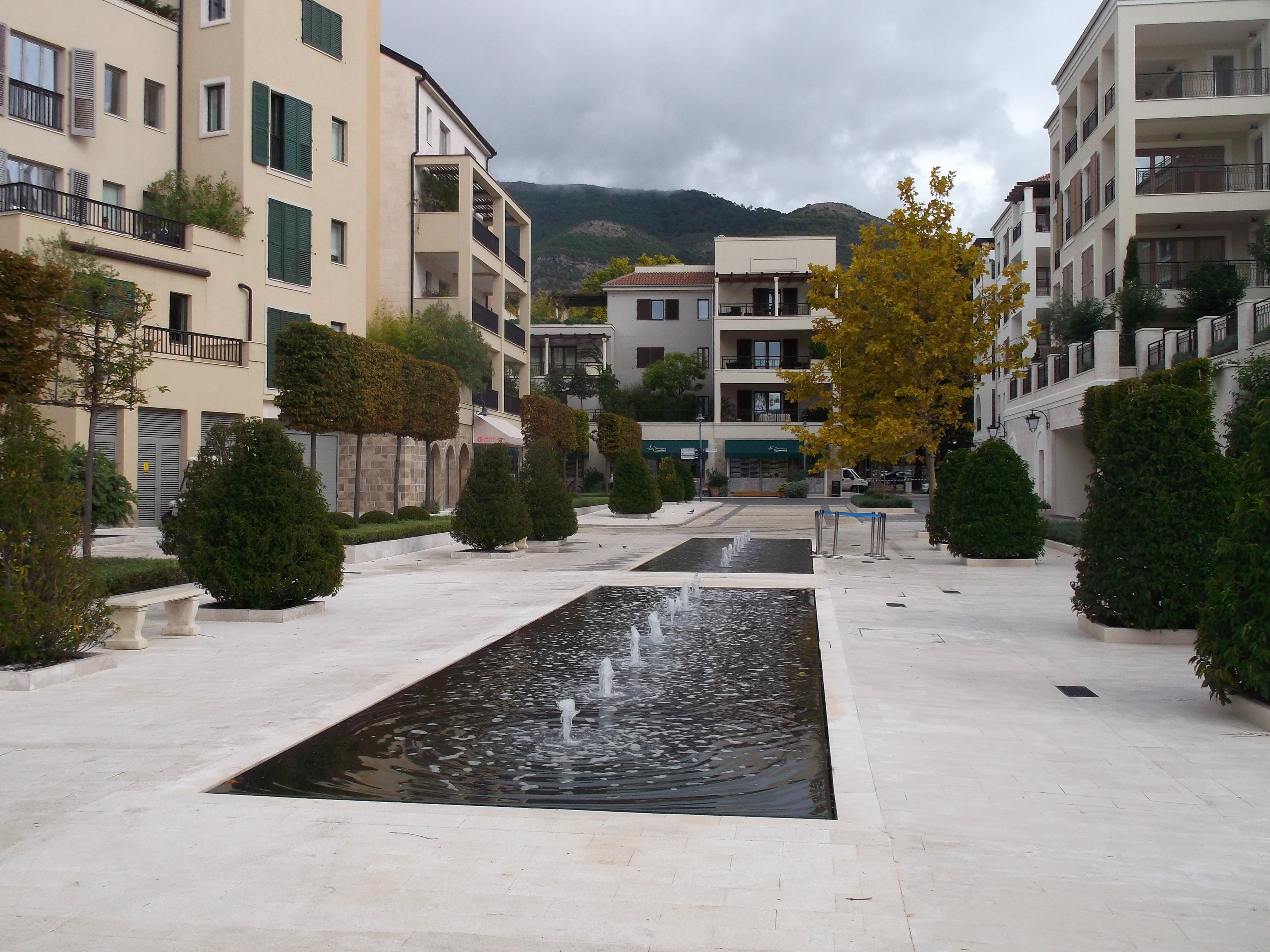 Residence Ozana, Setaliste kroz Porto Montenegro, Tivat, Montenegro